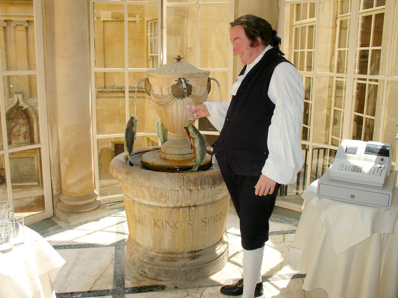 Pijalnia wody mineralnej w łaźni rzymskiej w Bath (Anglia) Drinking mineral water in Roman Baths, Bath, England, UK.